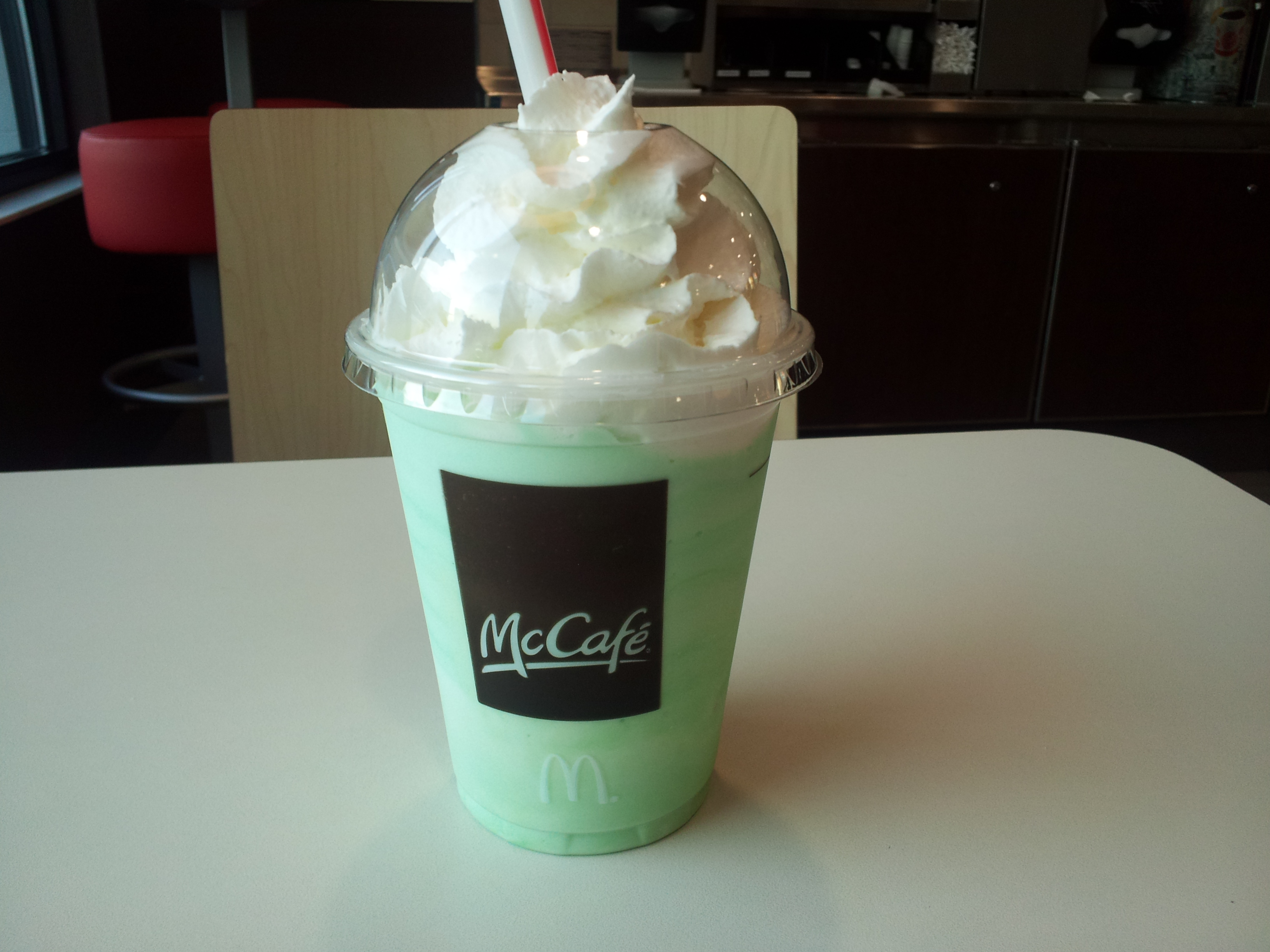 Shamrock Shake